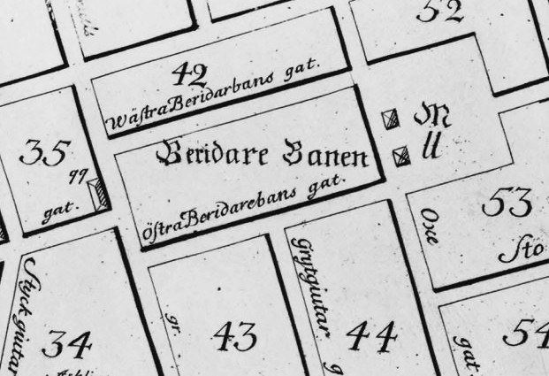 Beridarebanan och Hötorget (M) på Petrus Tillaeus karta 34: Gropen 35: Sporren 42: Adam och Eva 43: Putten 44: Upwachtaren